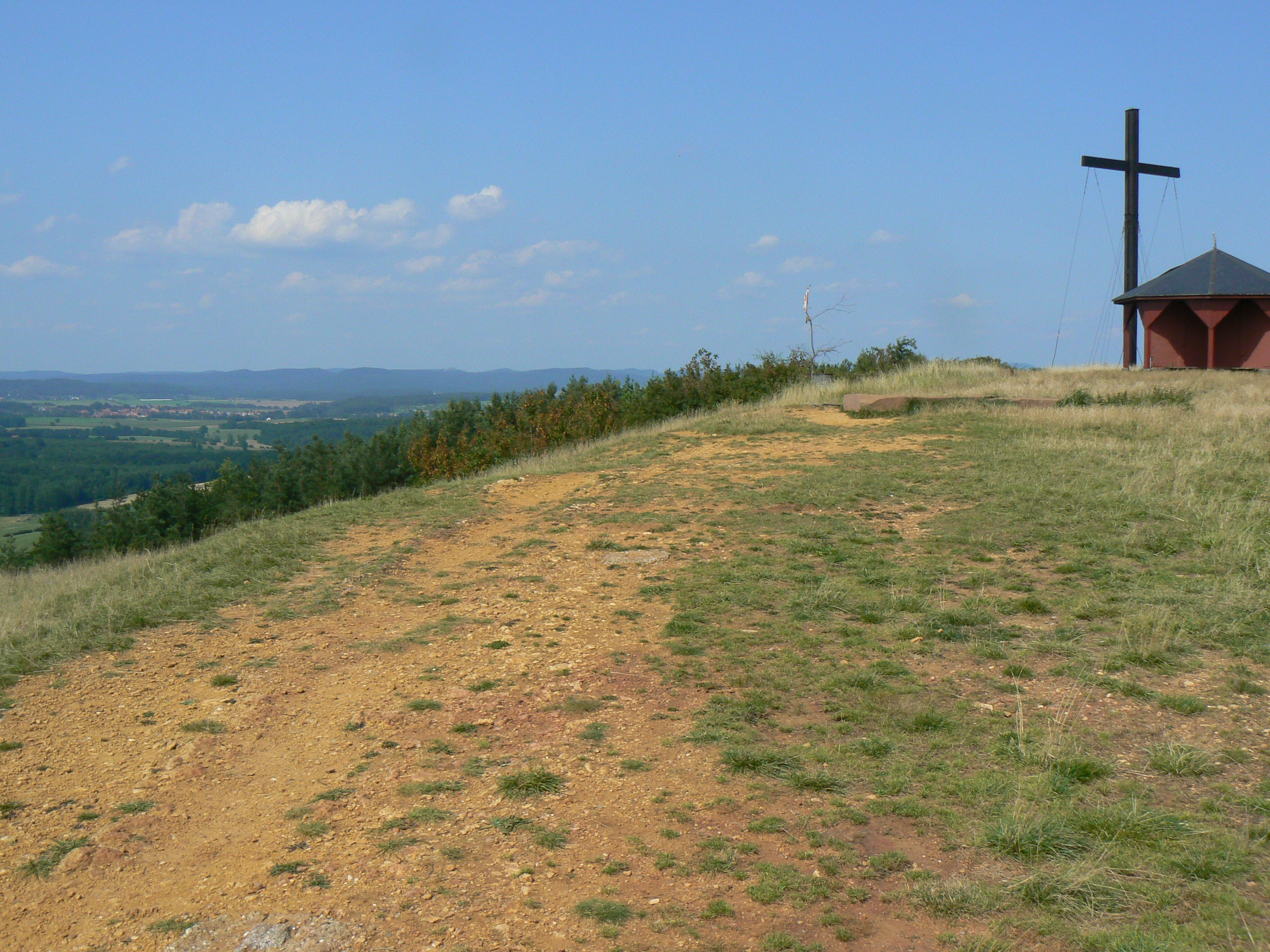 Sommet de la colline du Bastberg à Bouxwiller, Bas Rhin